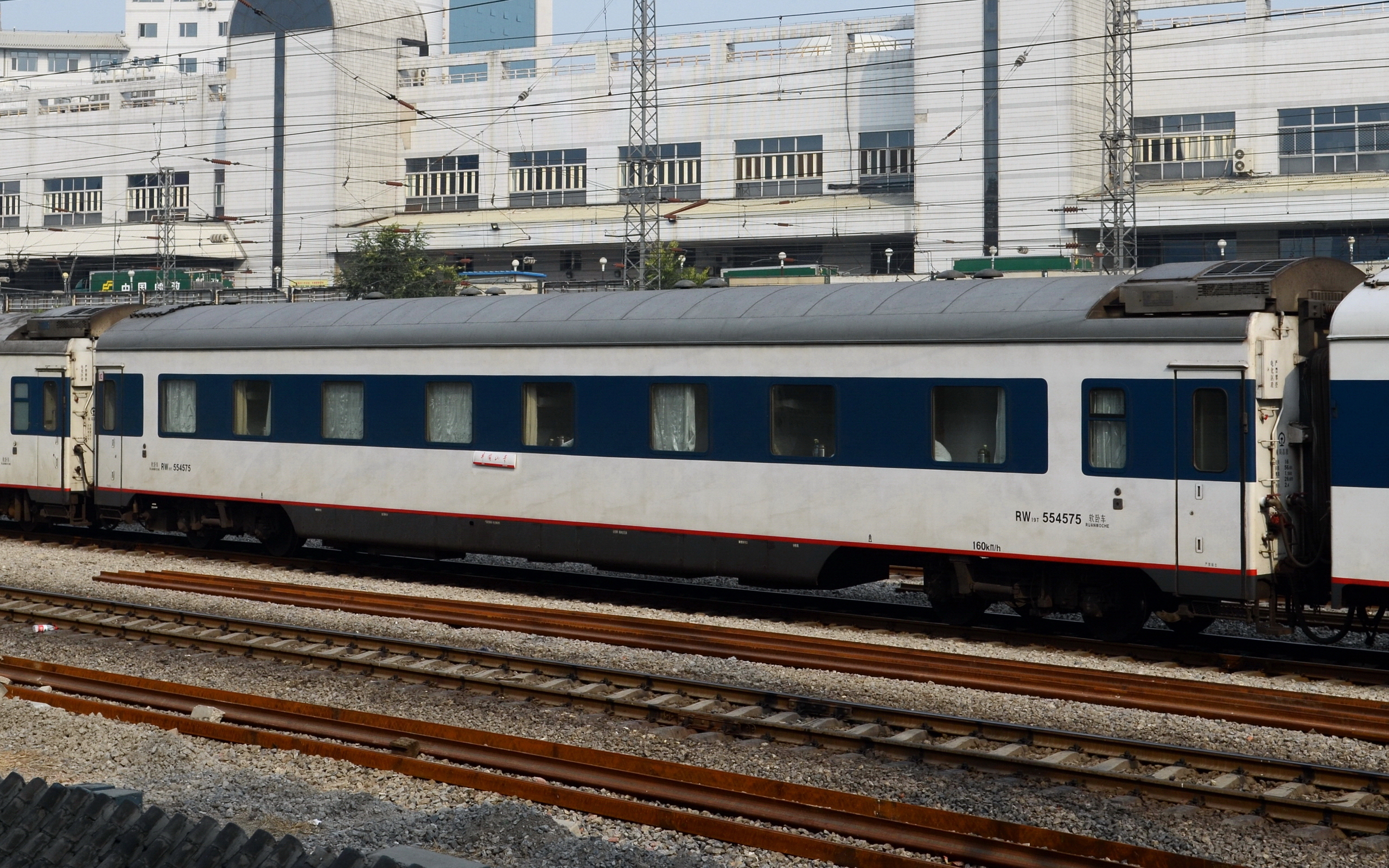 井冈山至北京西Z133/134次“井冈山号”直达特快列车编组中的RW19T型客车，拍摄于北京西客站